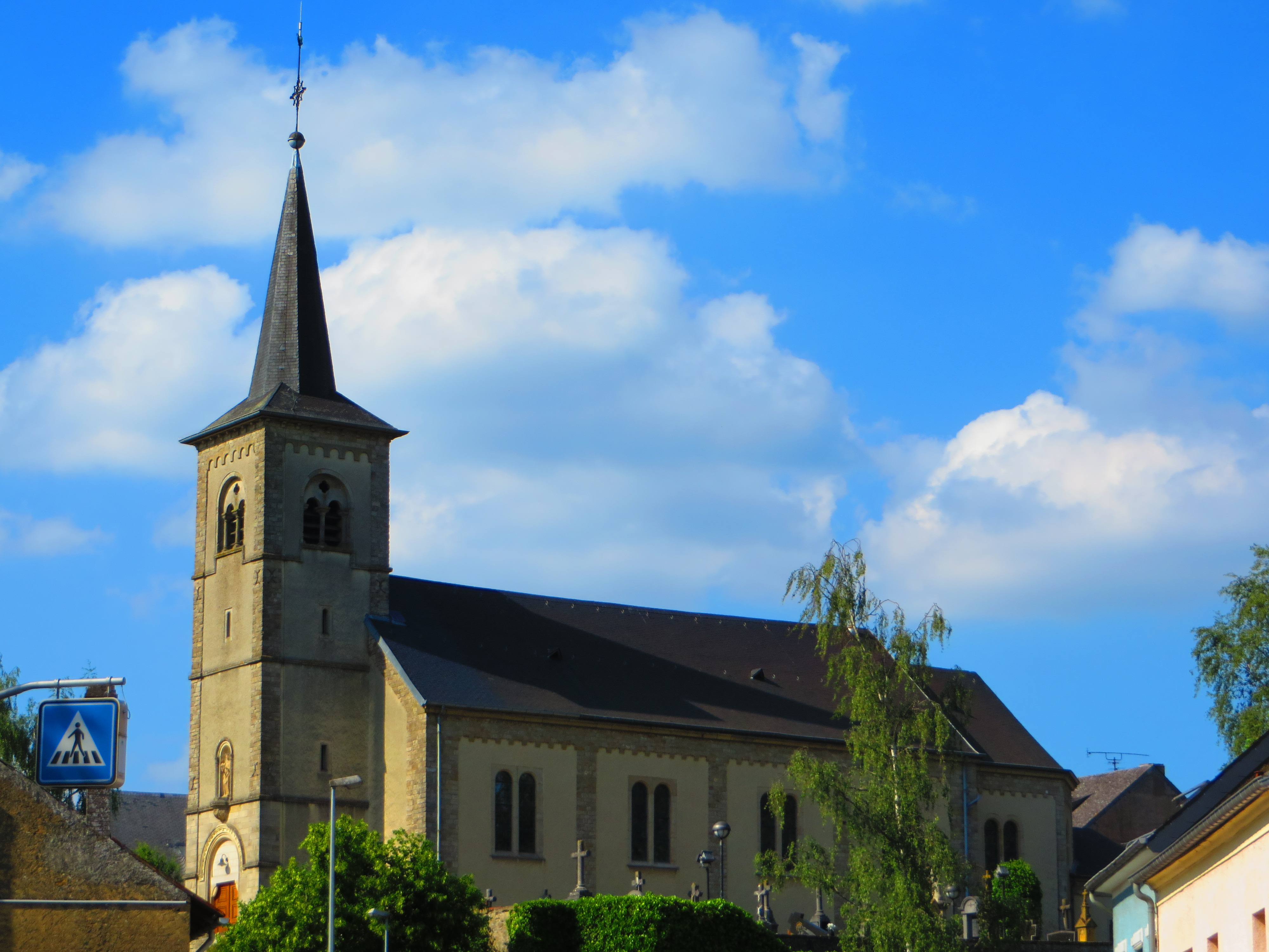 Altwies LUX eglise